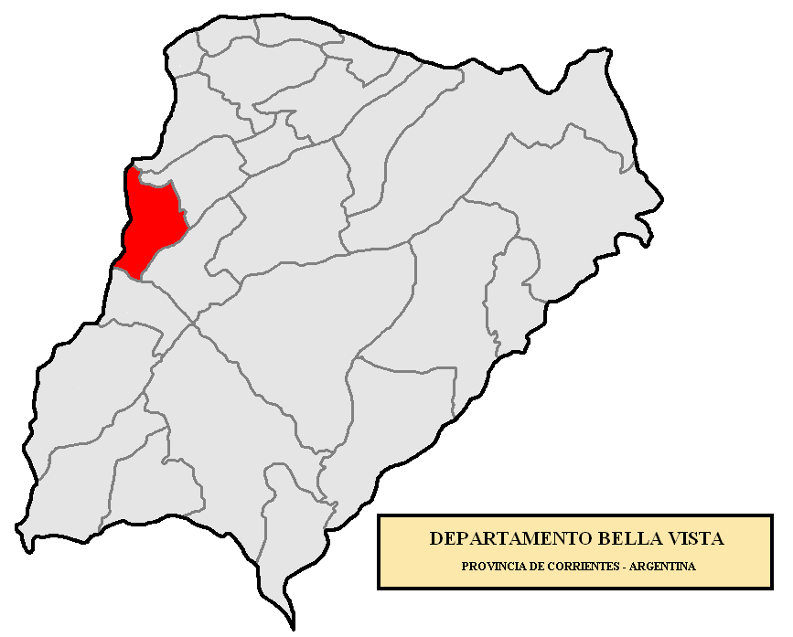 Localización del Departamento Bella Vista en la provincia de Corrientes, Argentina Localización del Departamento de Bella Vista, en la provincia de Corrientes, Argentina.